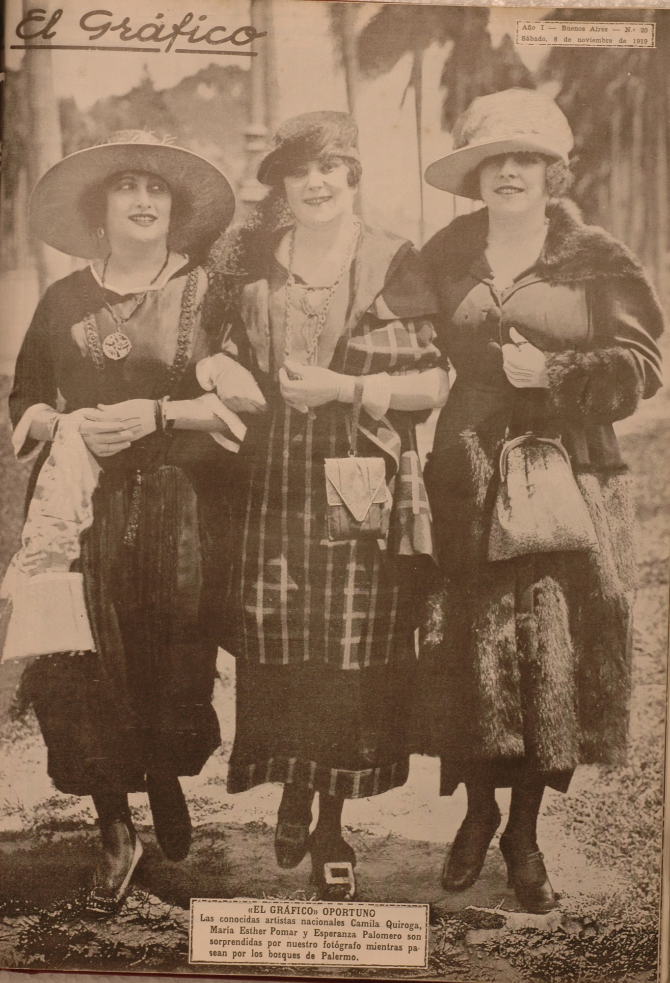 El Grafico del 08 de Noviembre de 1919. Edicion 20